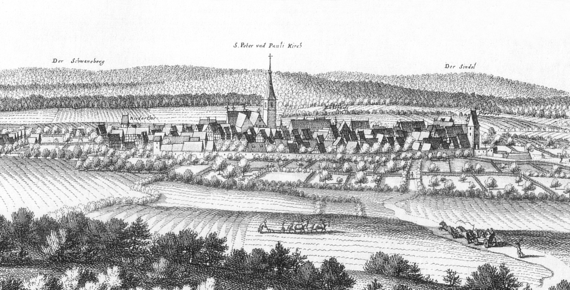 Münder